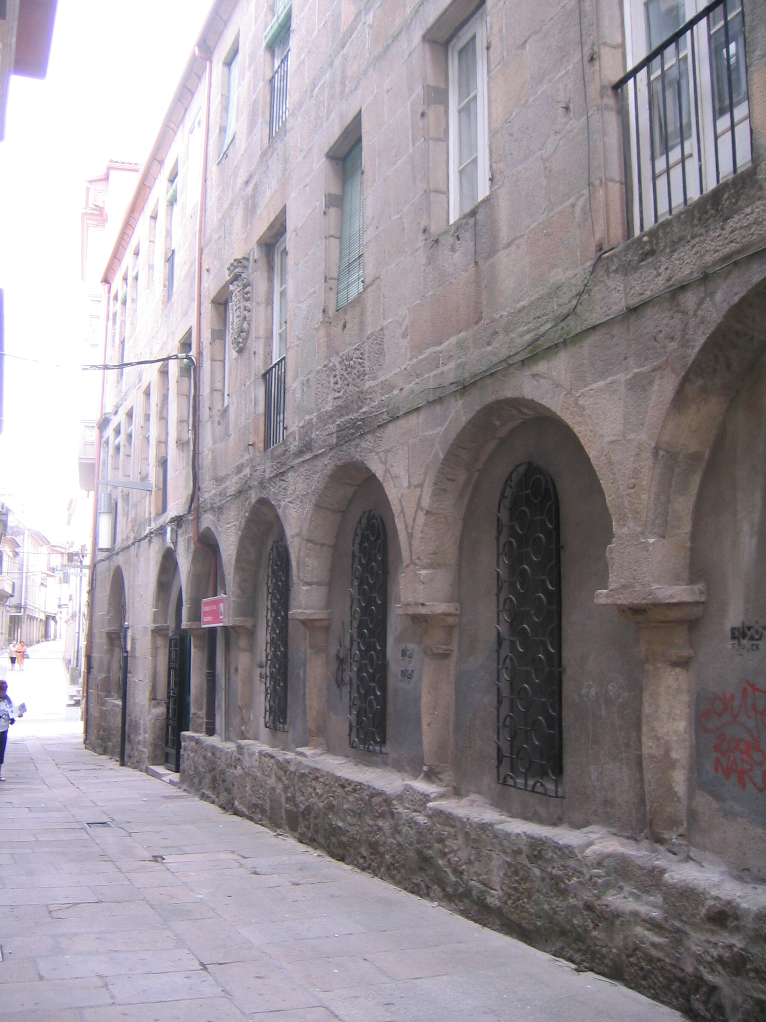 Pontevedra, Galicia (España). Santuario de las apariciones. Antiguo colegio de las Madres Doroteas en donde residió Sor Lucía después de las apariciones de la virgen en Fátima. Aquí se apareció en 1925.